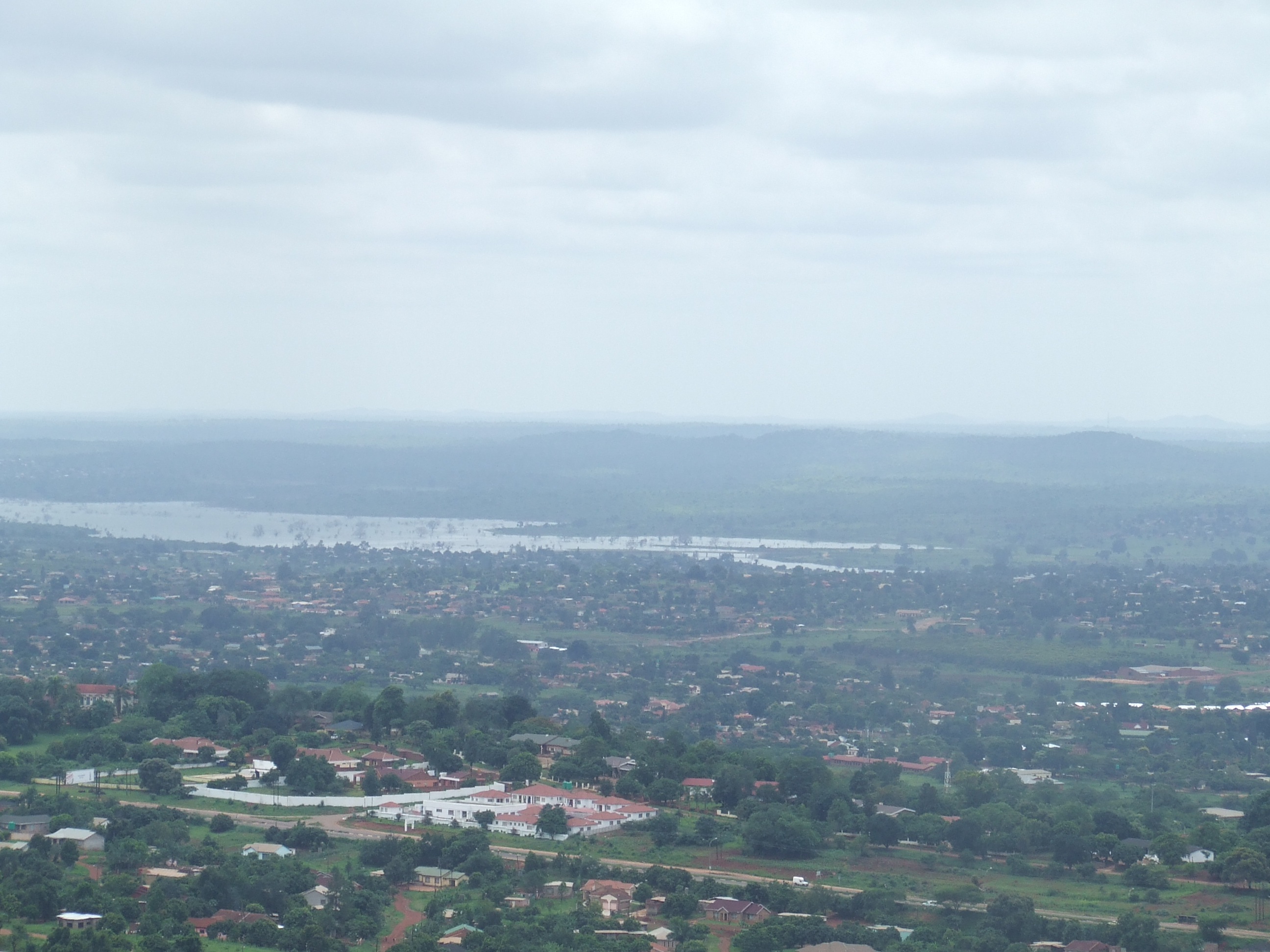 Nandoni Dam, Thohoyandou